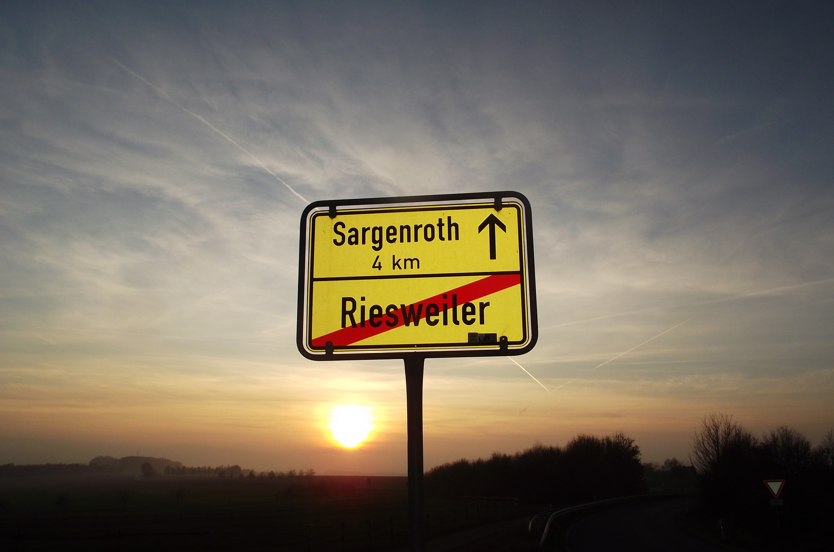 Ortsausgangsschild Riesweiler bei Sonnenuntergang im November